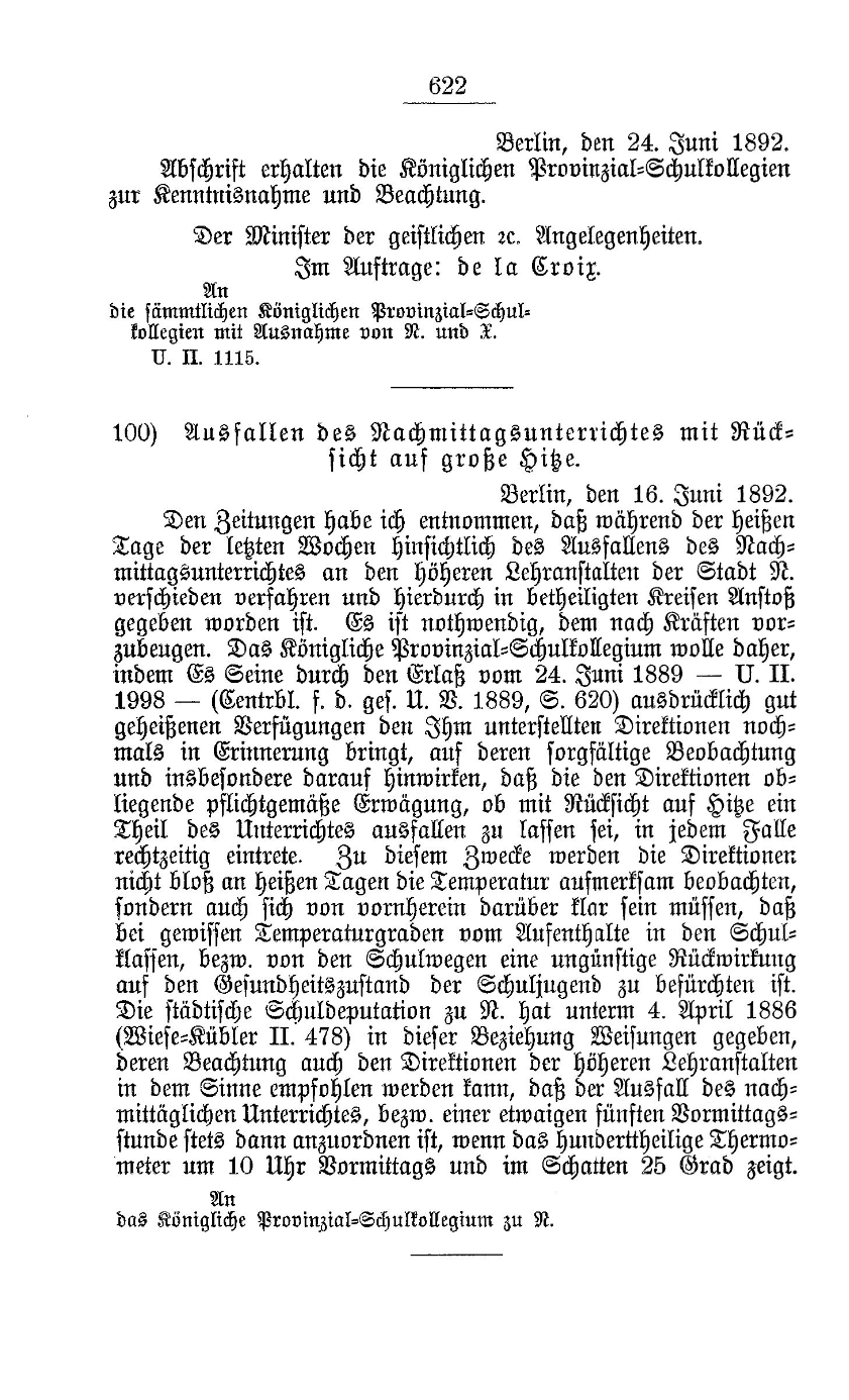 Ausfallen des Nachmittagsunterrichtes mit Rücksicht auf große Hitze (Zentralblatt für die gesamte Unterrichtsverwaltung in Preußen - 1892 (34), S. 622)